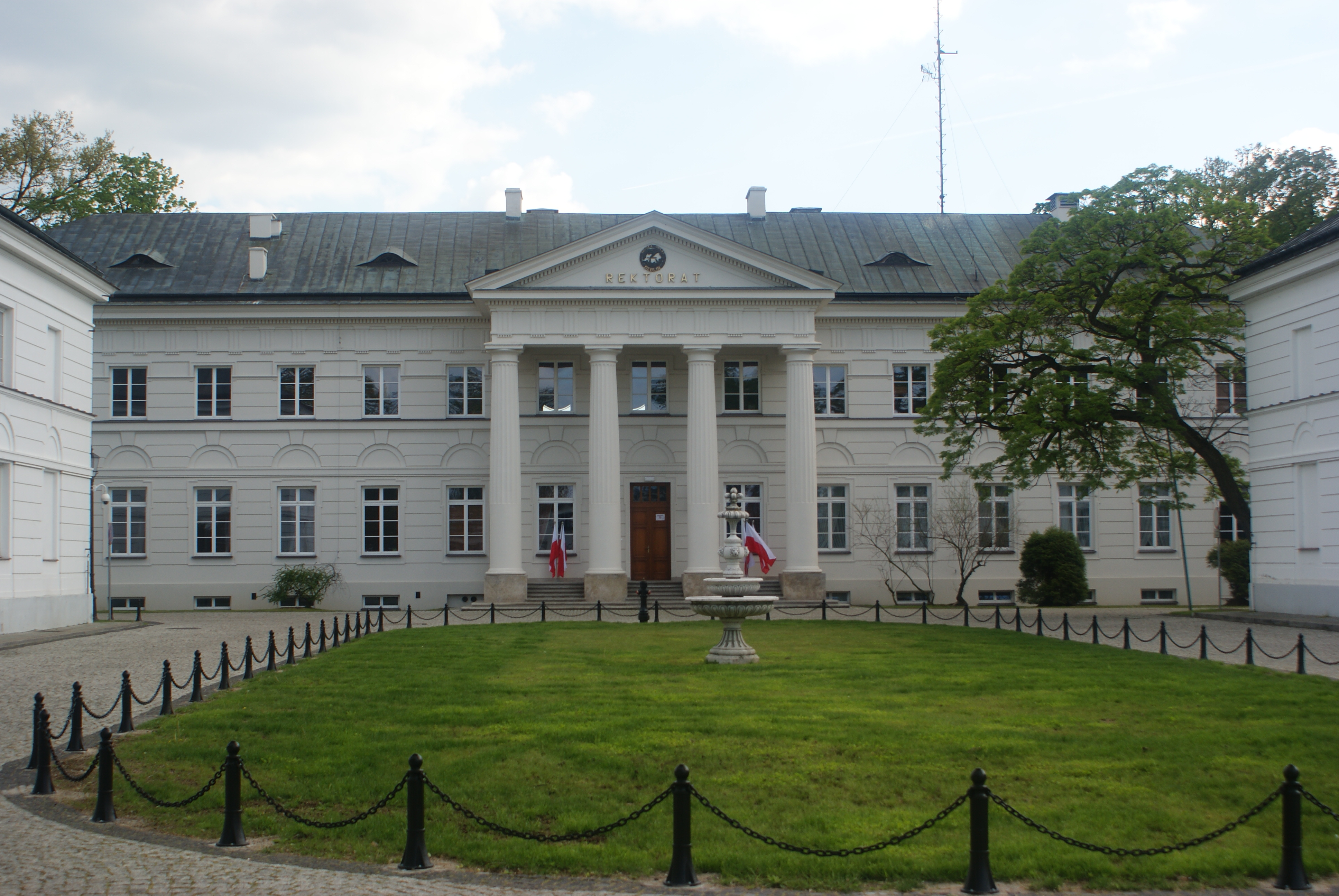 Dęblin, zespół pałacowy, XVIII